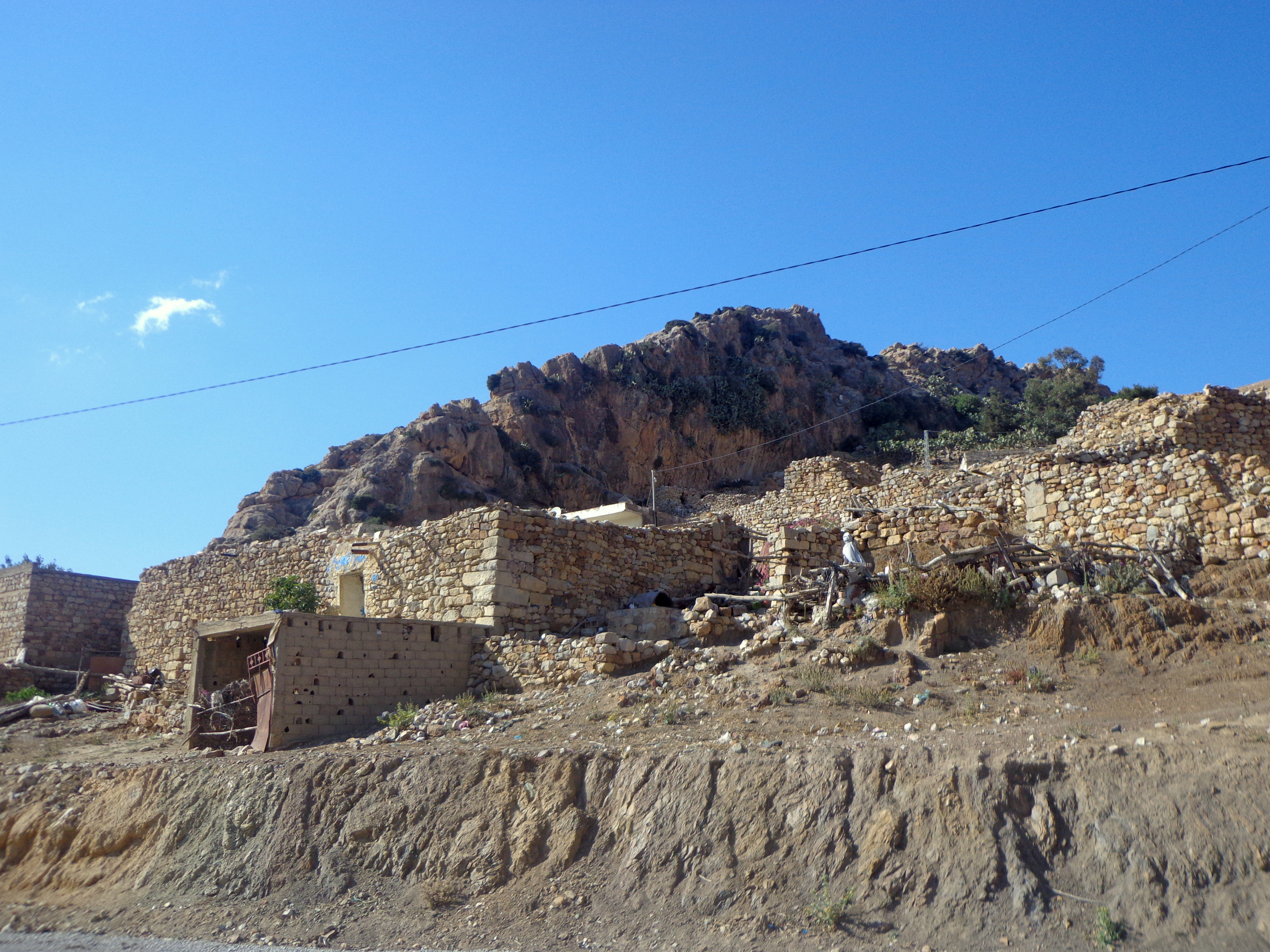 village de sidi medien